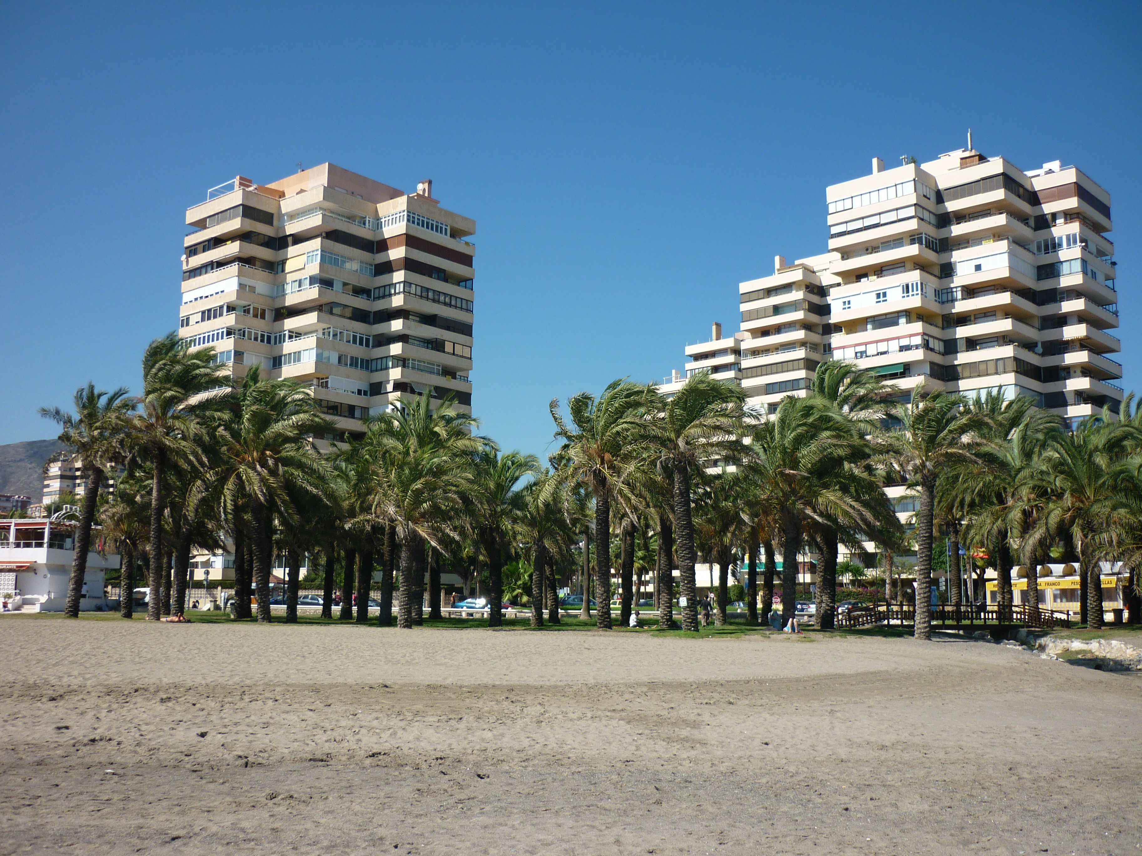 Près de Malaga, et près de l'aéroport